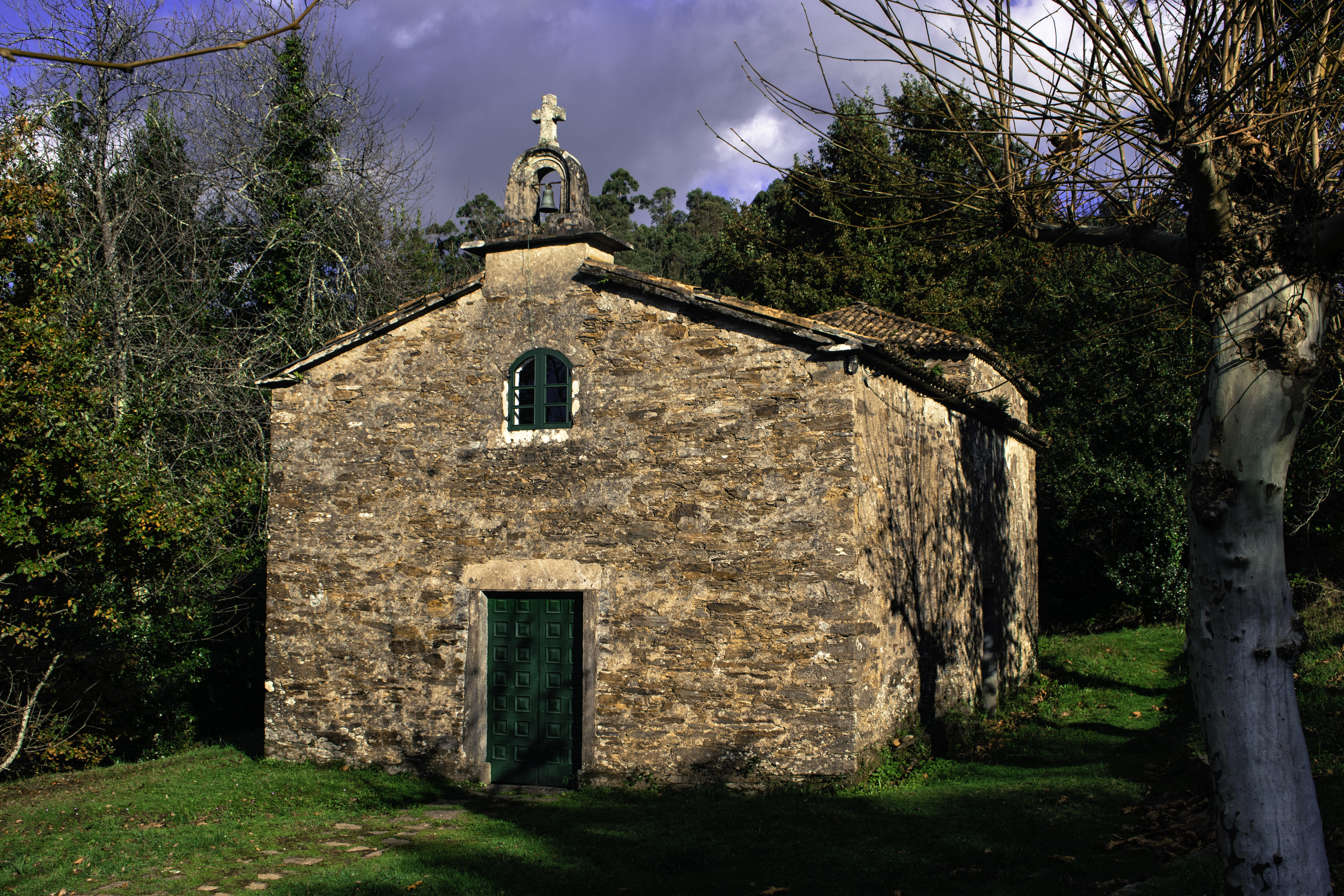 Capela de Santa Irene de Arca, no concello coruñés do Pino.